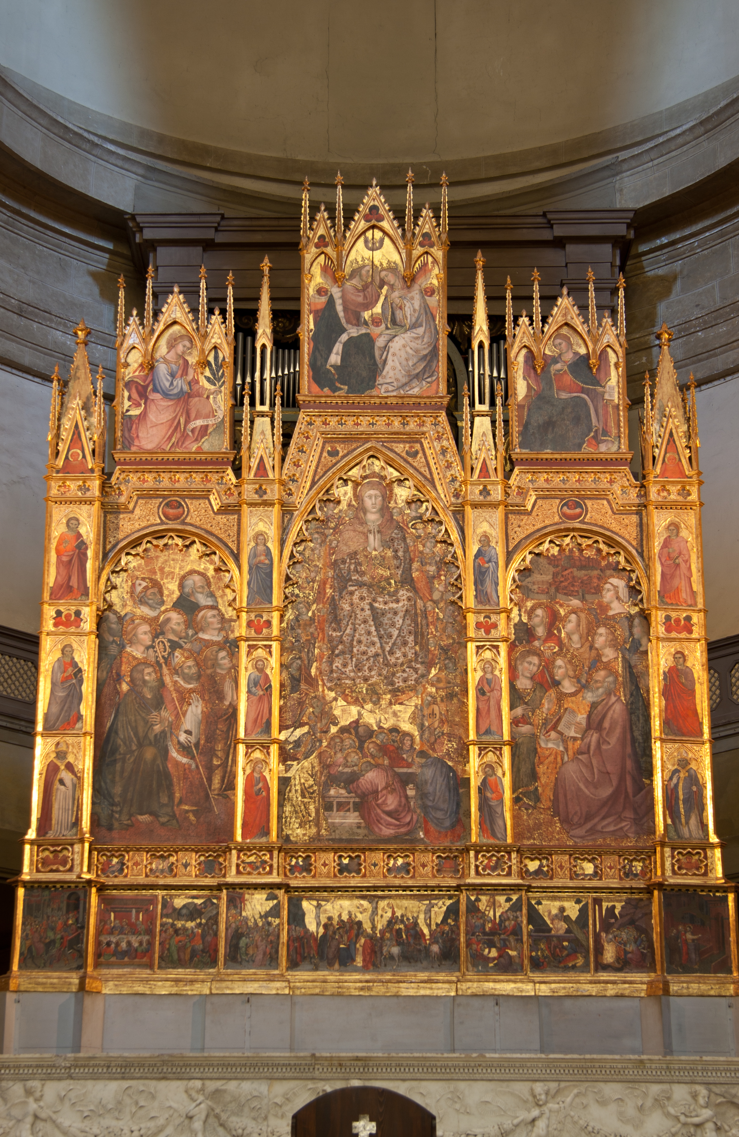 Trittico dell'Assunta